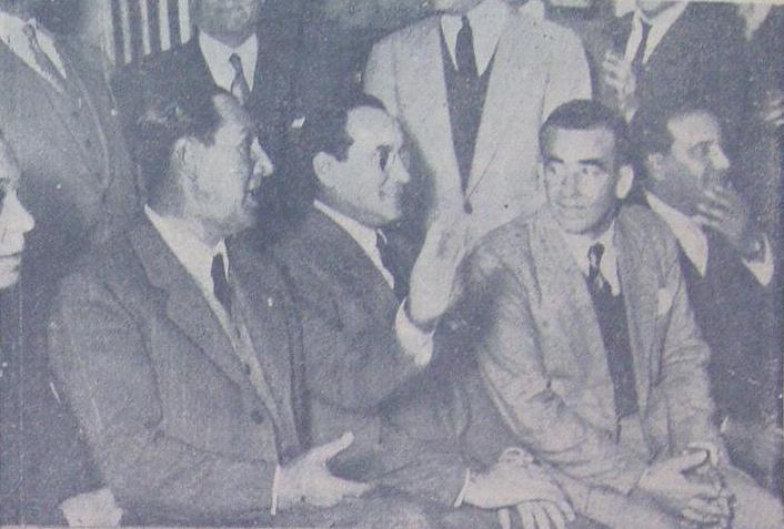 El presidente electo Juan Domingo Perón, junto al presidente del Partido Laborista Luis Gay, conversa con un delegado en el local partidario de la calle Cangallo (hoy Tte. Gral. Perón) 2535.